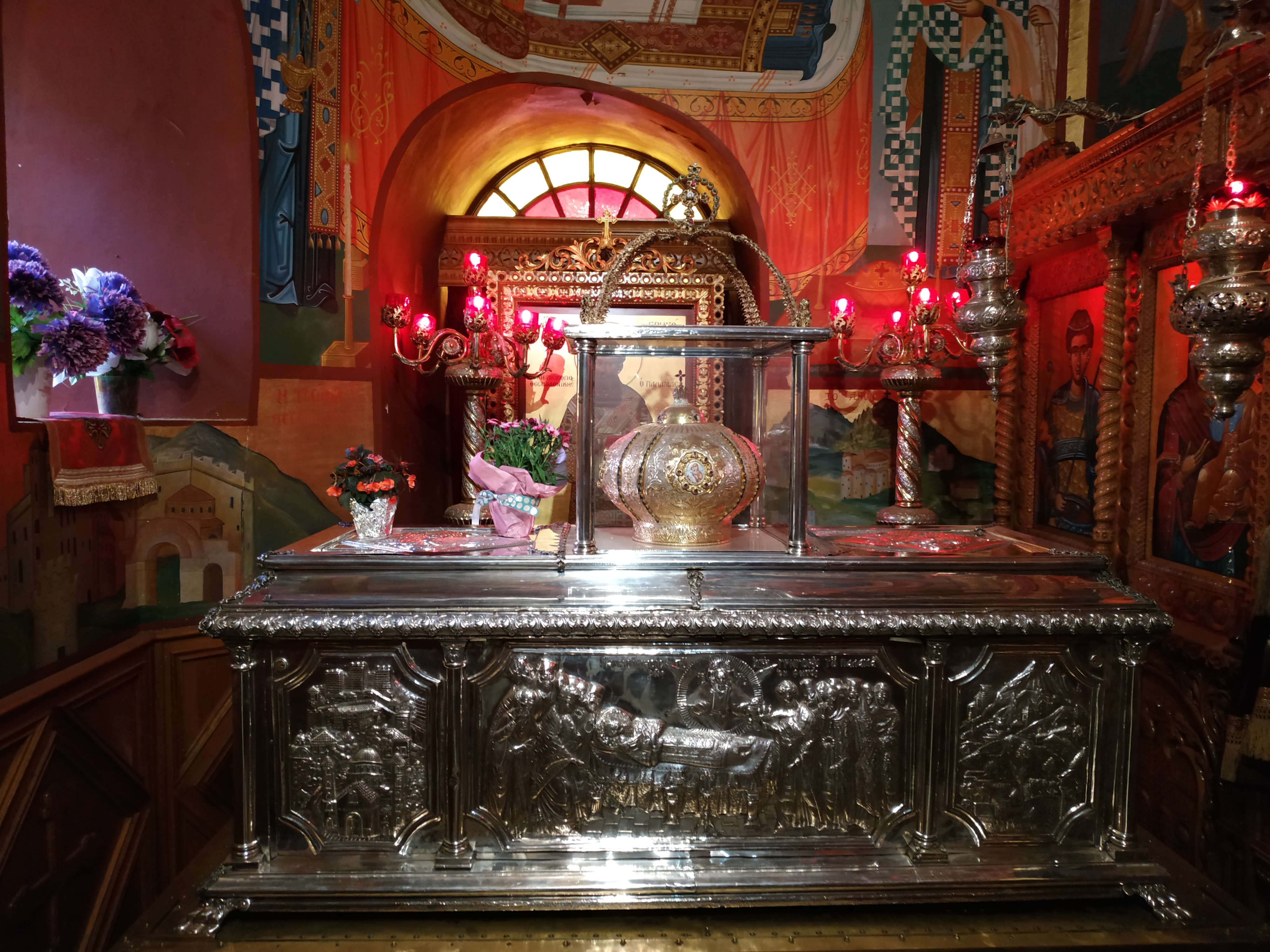 Рака з мощами святого Григорія Палами. Салоніки, Греція. знаходиться в храмі на честь святого.